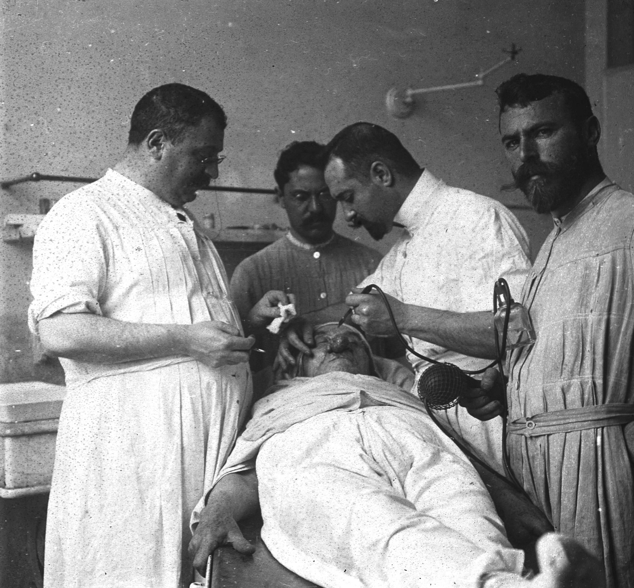 C43f426. Operación de elefantiasis